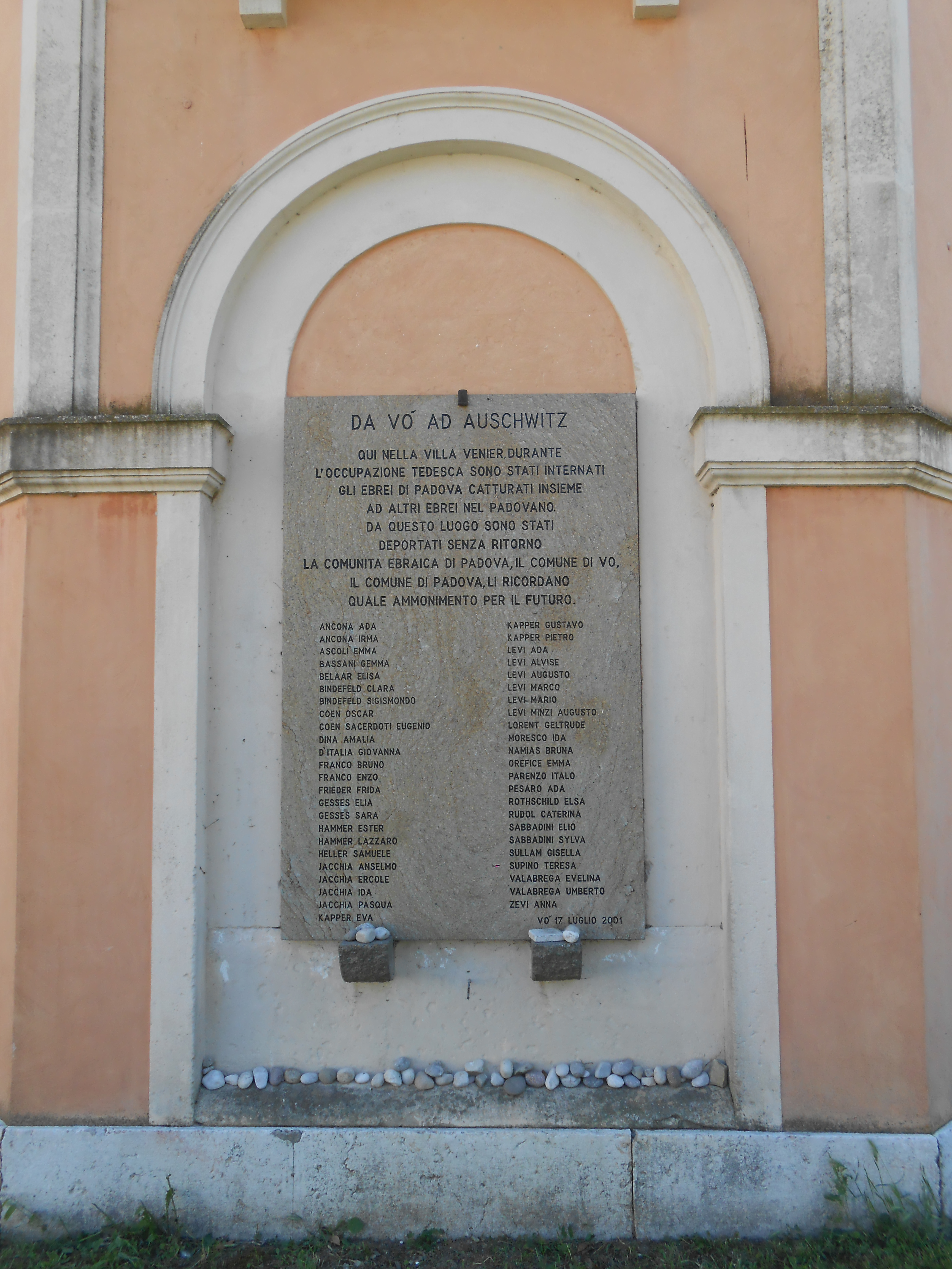 lapide, campo di concentramento, villa Contarini Giovanelli Venier, Vo' vecchio, Vo' Euganeo